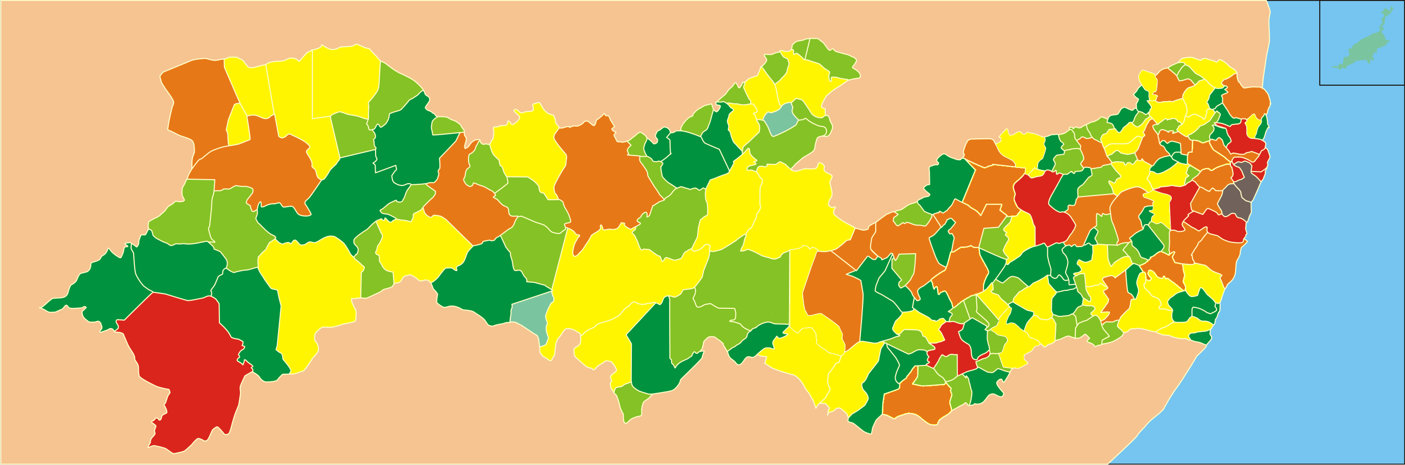 Mapa do estado de Pernambuco mostrando a população residente em cada um dos 185 municípios em 2011. (As sete cores diferentes significa a população residente em cada município de acordo com a legenda abaixo). Legenda: Acima de 500 000 hab 100 000 a 500 000 hab 45 000 a 100 000 hab 24 000 a 50 000 hab 15 000 a 24 000 hab 5 000 a 25 000 hab 5 000 hab